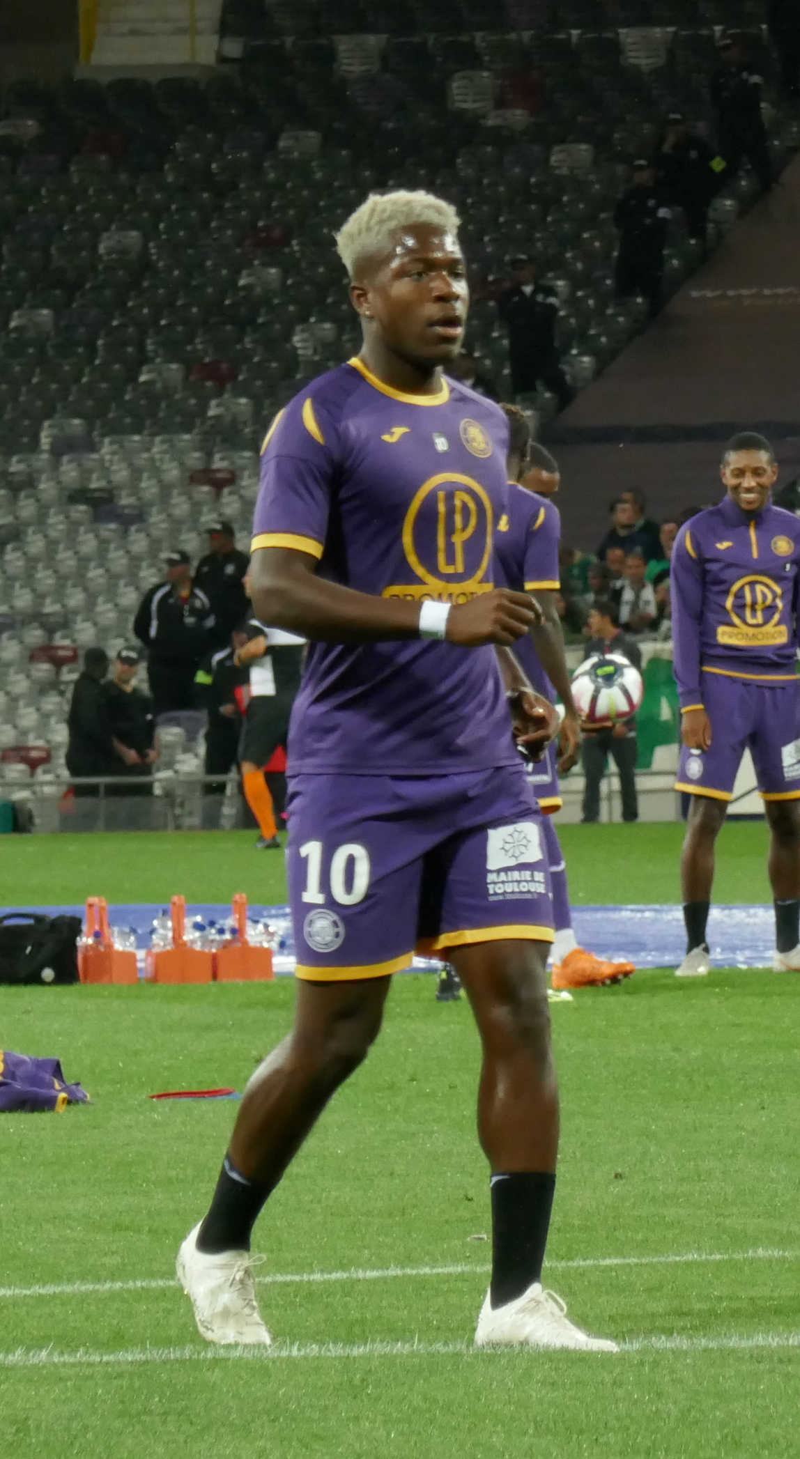 Aaron Leya Iseka à l’échauffement sous les couleurs du TFC avant le match TFC-ASSE comptant pour la Template:7e journée de Ligue 1 2018-2019.